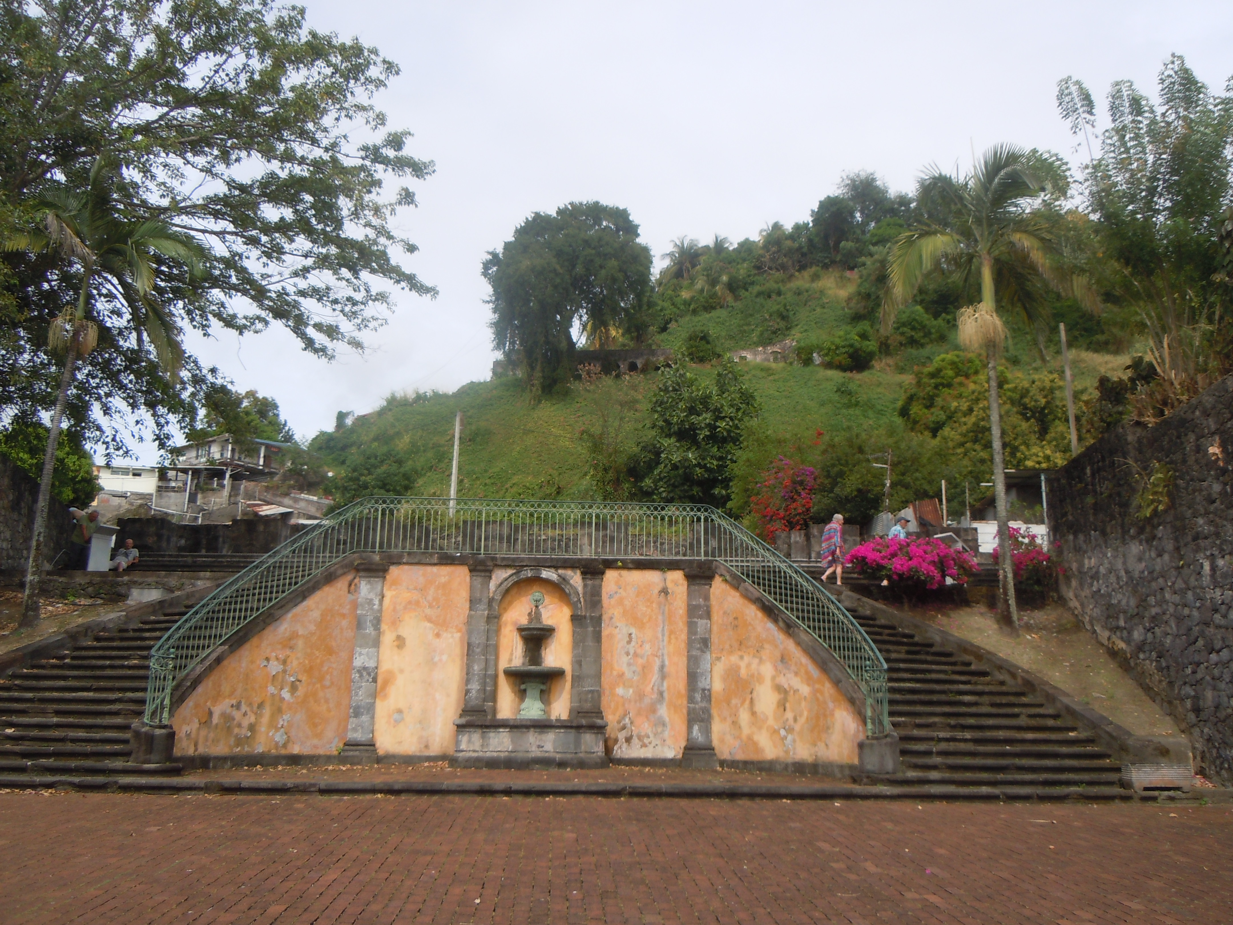 Ruines du Théâtre de Saint-Pierre, Martinique